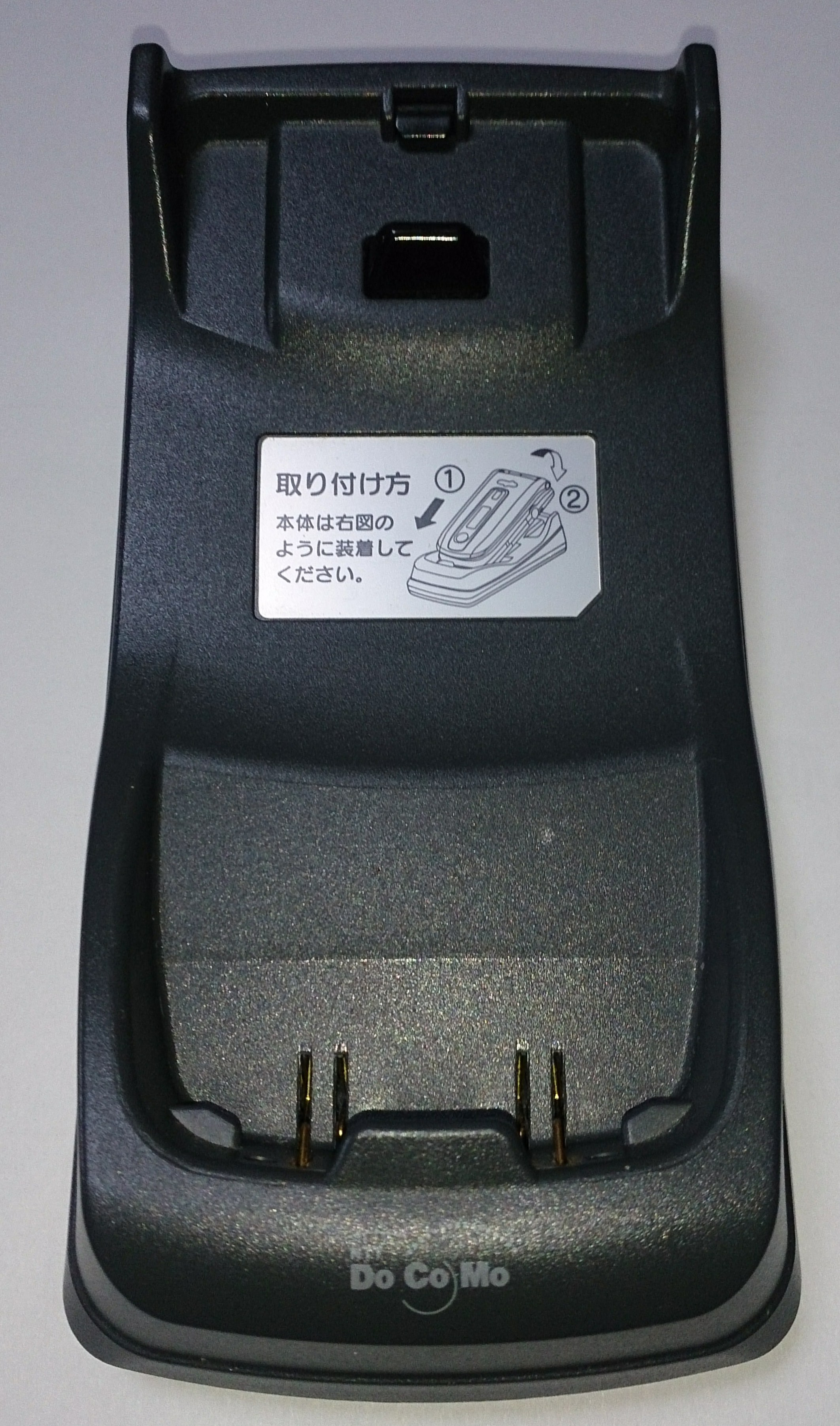 F2102V クレードル